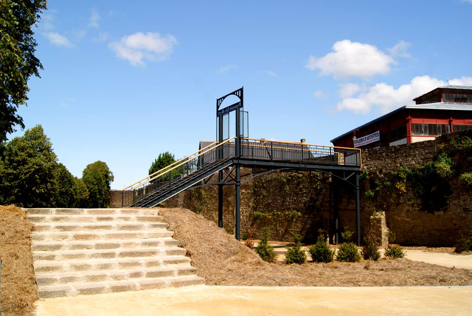 La promenade Jules Revert "les Douves" à Dol de Bretagne - FRANCE